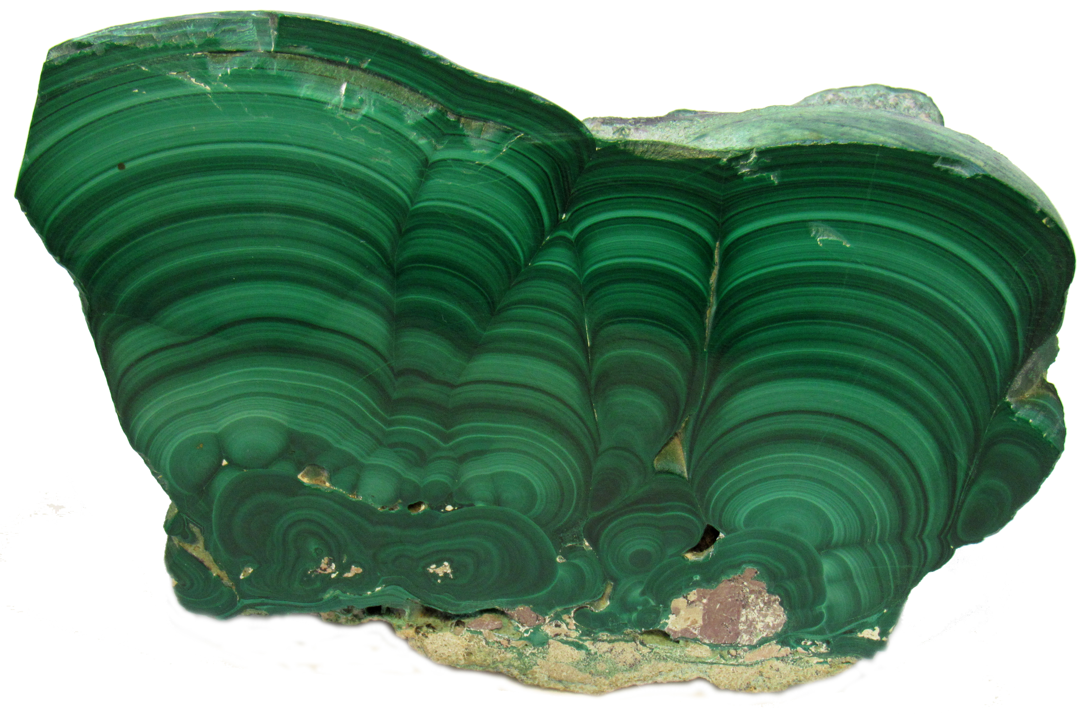 Malaquita. Masa bandeada seccionada. Mina L'Etoile du Congo, Katanga, República Democrática del Congo